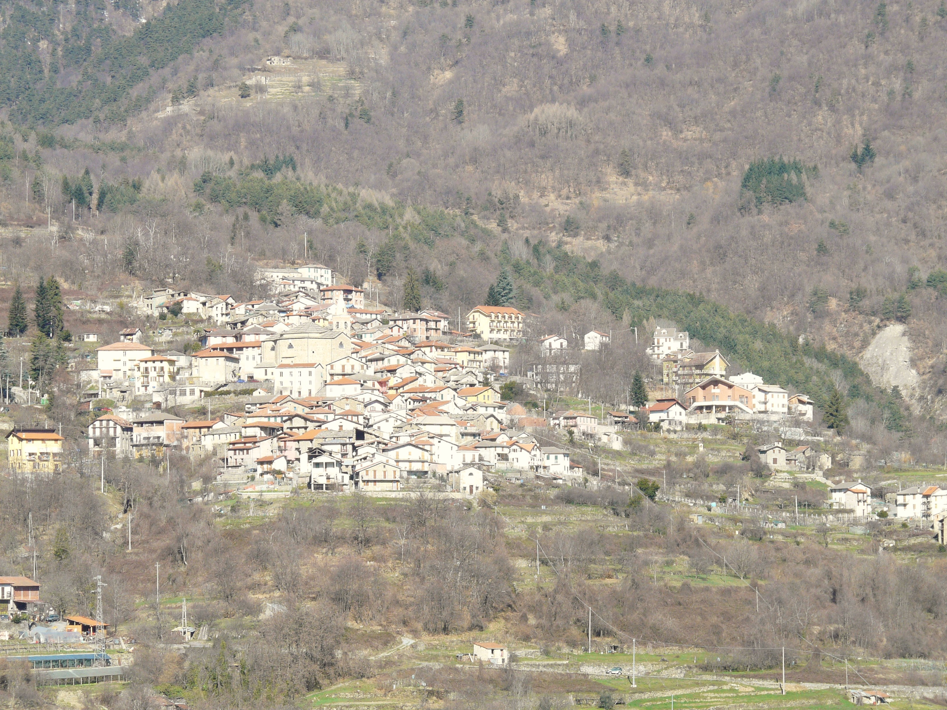 Mendatica, Liguria, Italia